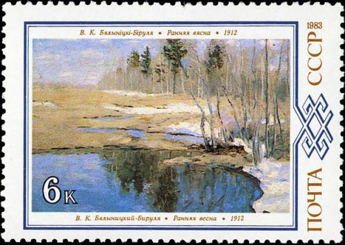 Беларуская (тарашкевіца): «Раньняя вясна». Карціна Вітольда Бялыніцкага-Бірулі (1912)